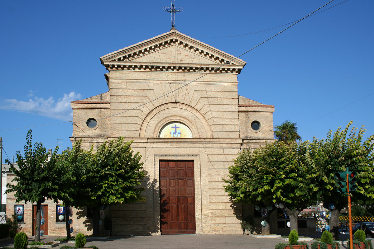 Facciata della chiesa dedicata alla Natività di Maria Vergine di Giulianova Lido, in provincia di Teramo. L'edificio religioso, consacrato il 30 luglio 1911, è stato eretto a parrocchia nel 1927.